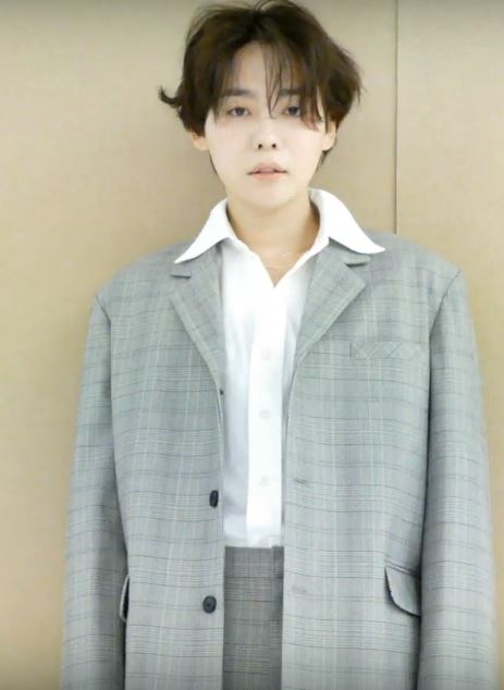 뷰티쁠 스타 정규 3집 리멤버로 돌아온 #위너 의 #진우 ! 뷰티쁠 4월호 커버를 장식한 진우는 어린 시절 무얼하고 놀았을까요? 거울만 봐도 즐거웠을 것 같은 비주얼의 진우가 그 시절을 회상하며 카메라 앞에 섰어요. #뜸 들이지 말고, 지금 바로 영상을 확인해보세요!